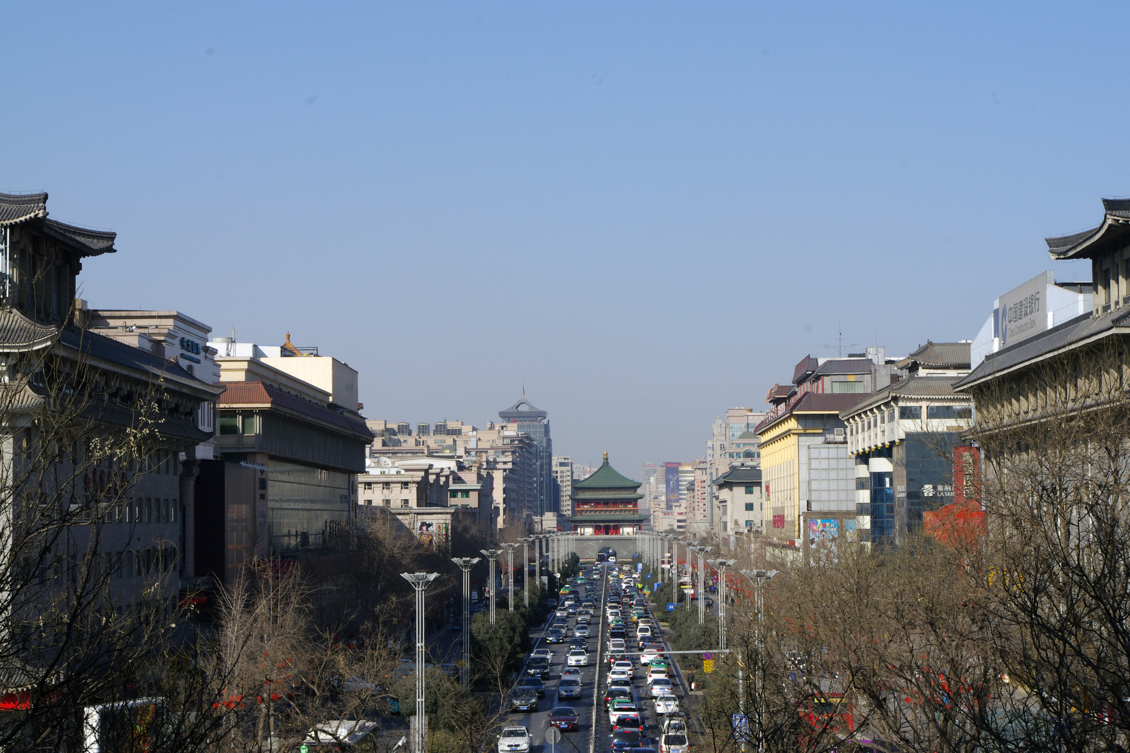 西安南大街